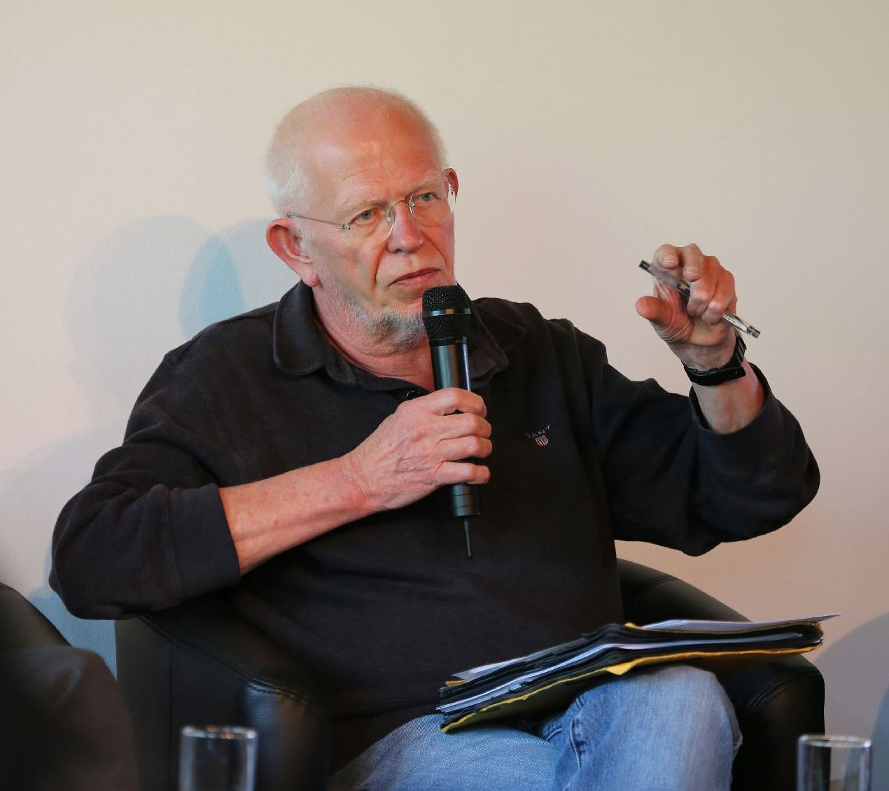 Gespräch über Gerechtigkeit und Gleichheit 14 Uhr Stephan Lessenich und Wolfgang Engler diskutieren über Zukunft und Gegenwart Mehr Lohn statt Verzicht. Spaltung der Belegschaft verhindern 16:30 Uhr Berlin, 24.4.2015 Im Rahmen der Linken Woche der Zukunft